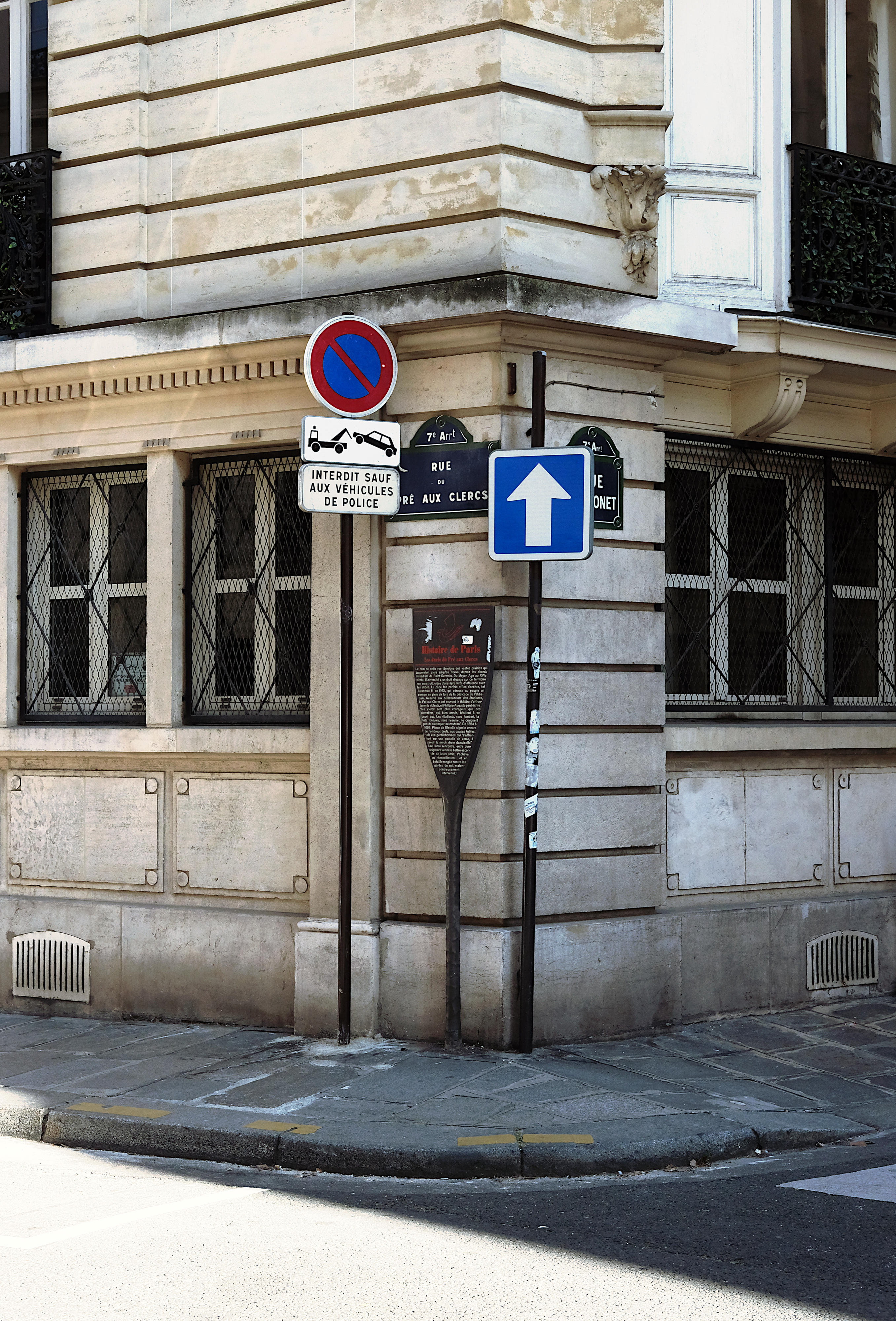 Paris VII - Panneau Histoire de Paris à l'angle des rues du Pré-aux-Clercs et Perronet.